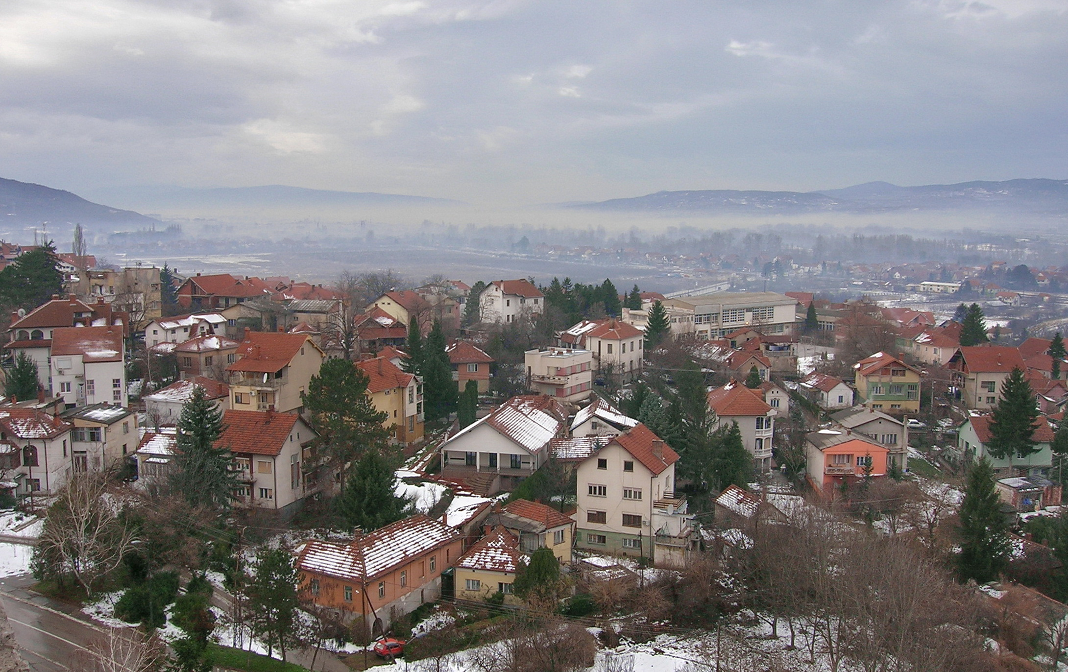 Pogled na Nišku kotlinu iz pravca Niške Banje.